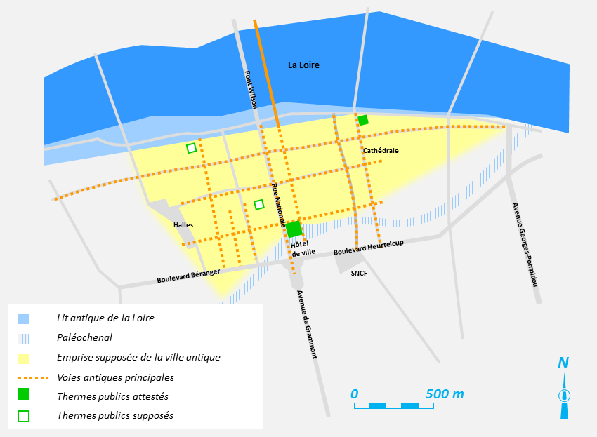 Emplacement des thermes antiques de Tours restitués sur un plan moderne.